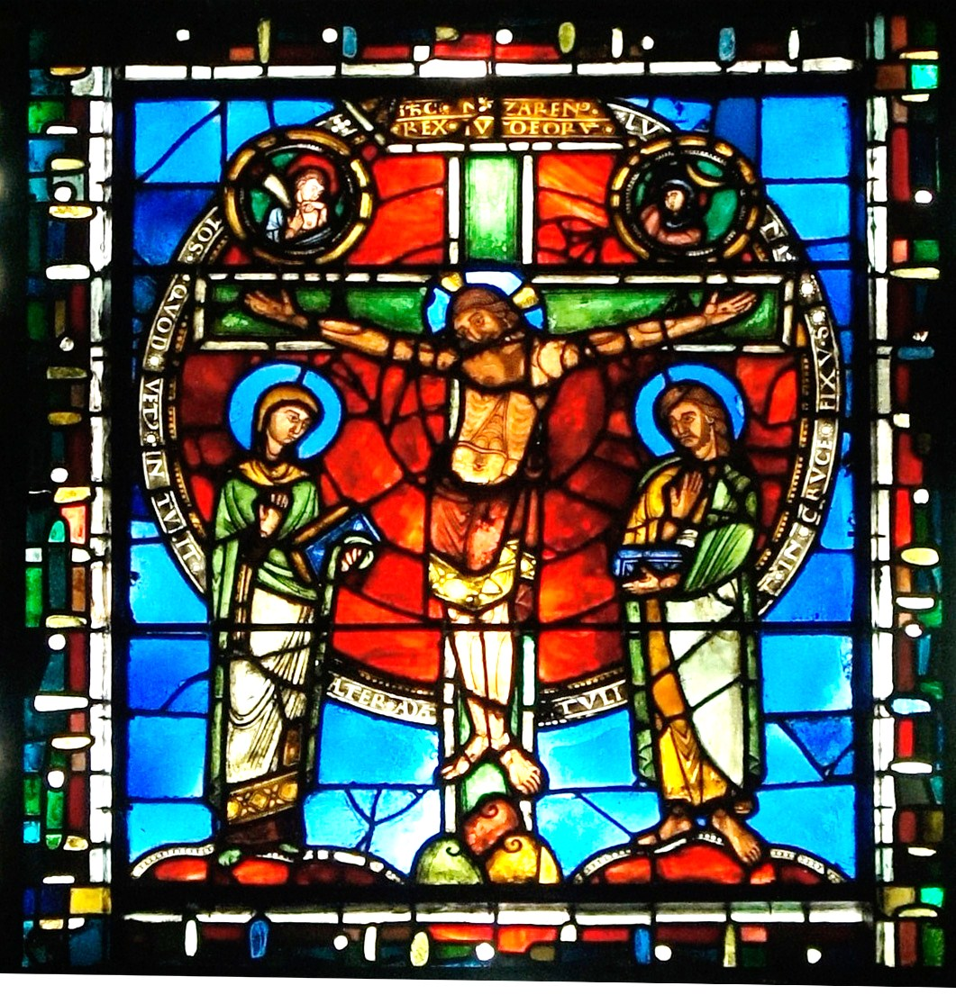 La Crucifixion, vue centrale du vitrail de la Rédemption, créé en 1155, se trouvant dans le trésor de la cathédrale.